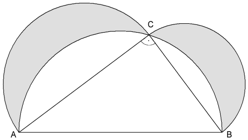 Möndchen des Hippokrates